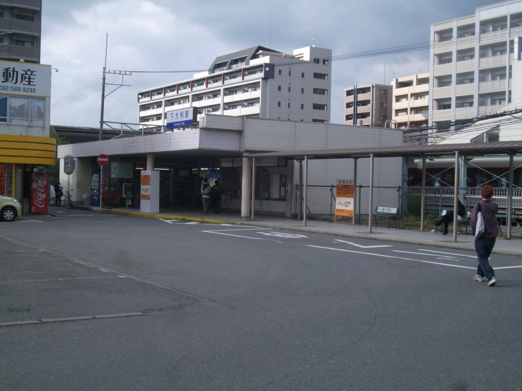 下大利駅西口駅舎